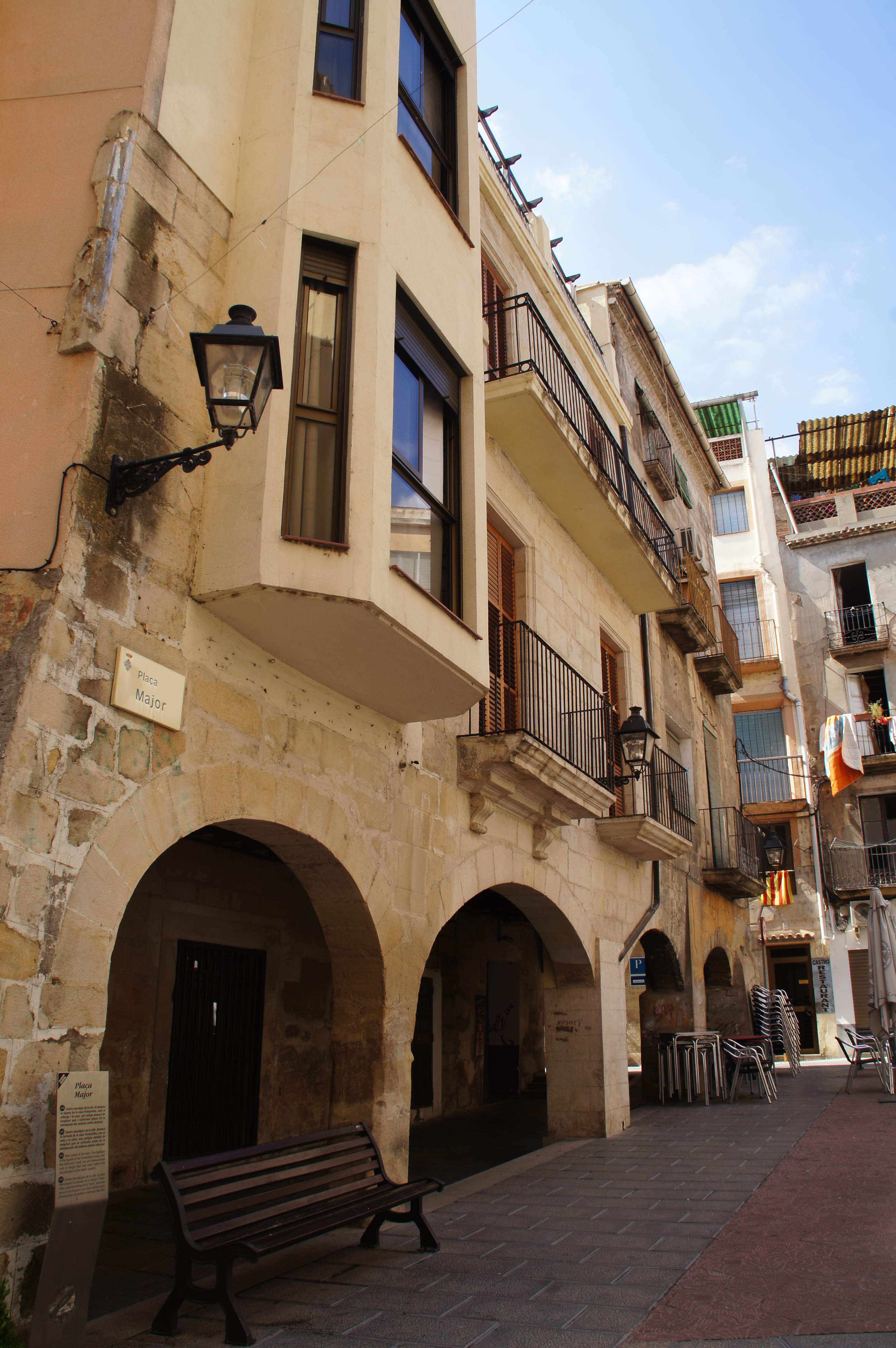 Porxos de Flix